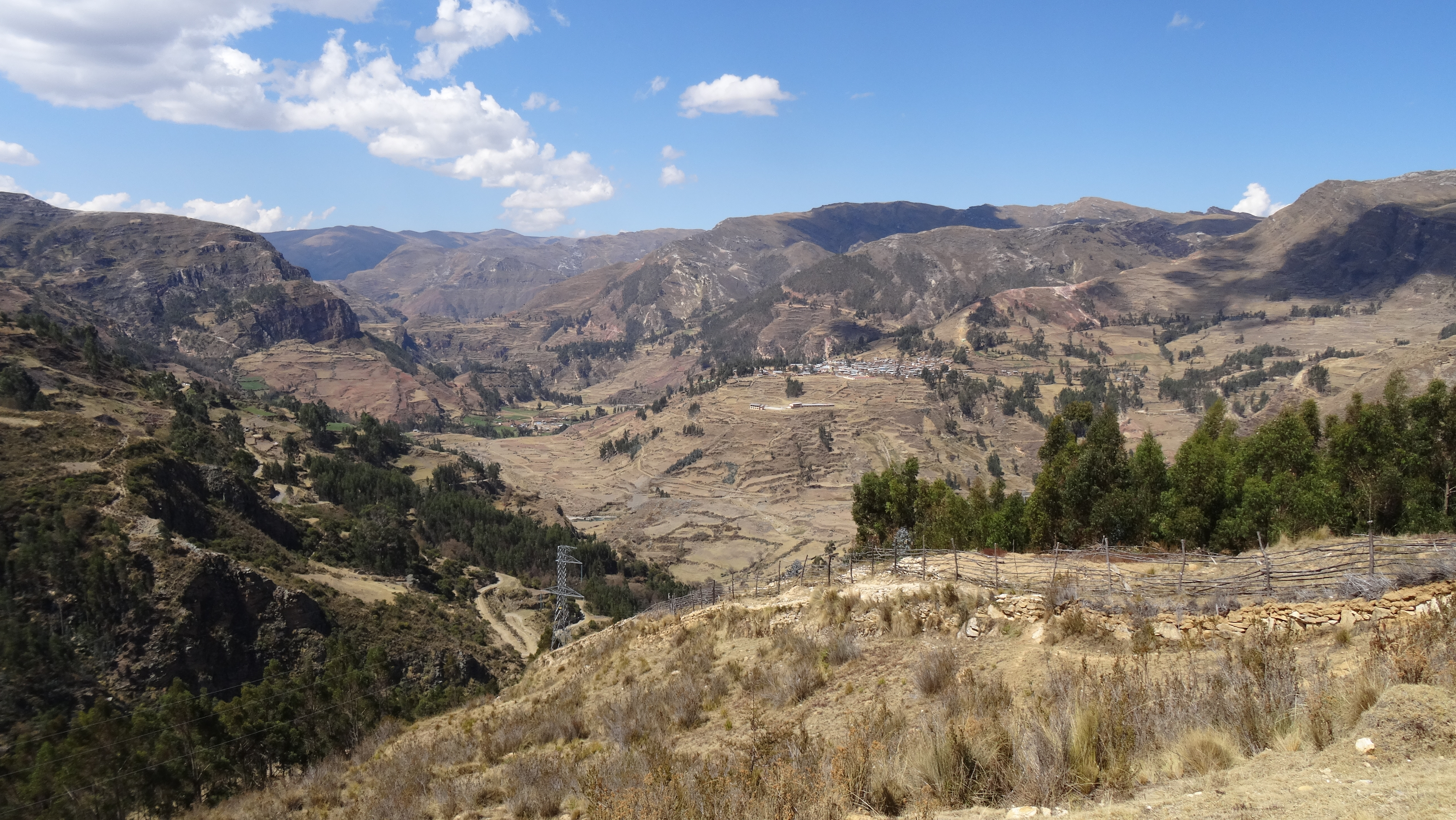 Vista de la parte noroeste del distrito de San Francisco de Asís, desde el vía hacia la ciudad de Rondos.